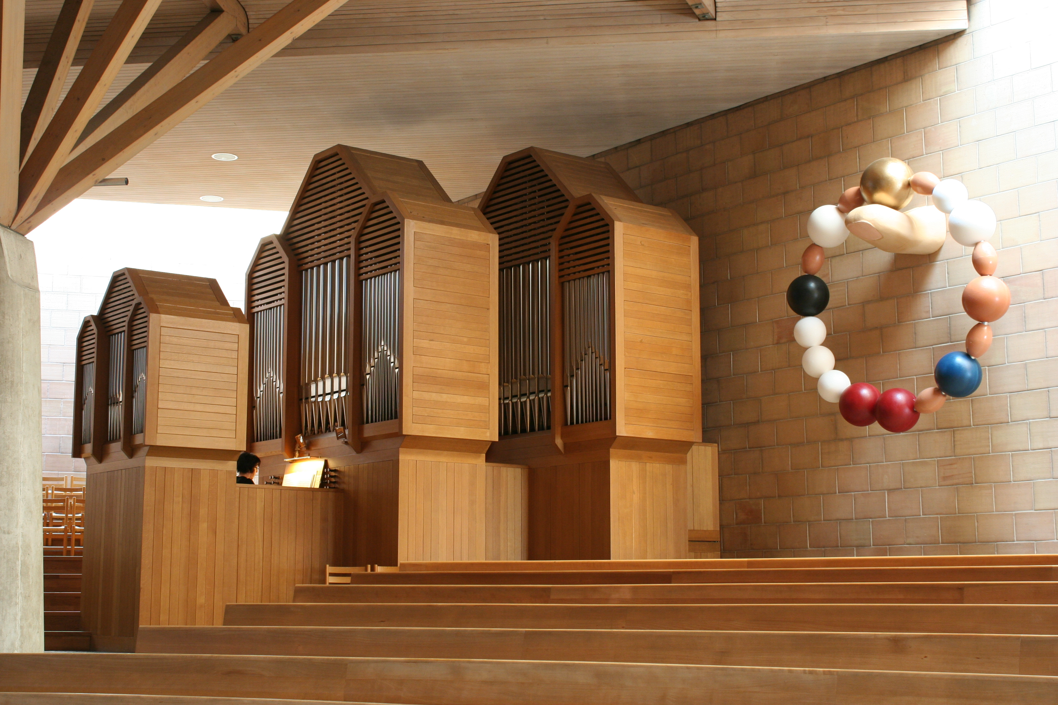 Römisch-katholische Pfarrkirche Christkönig Kloten, Orgel